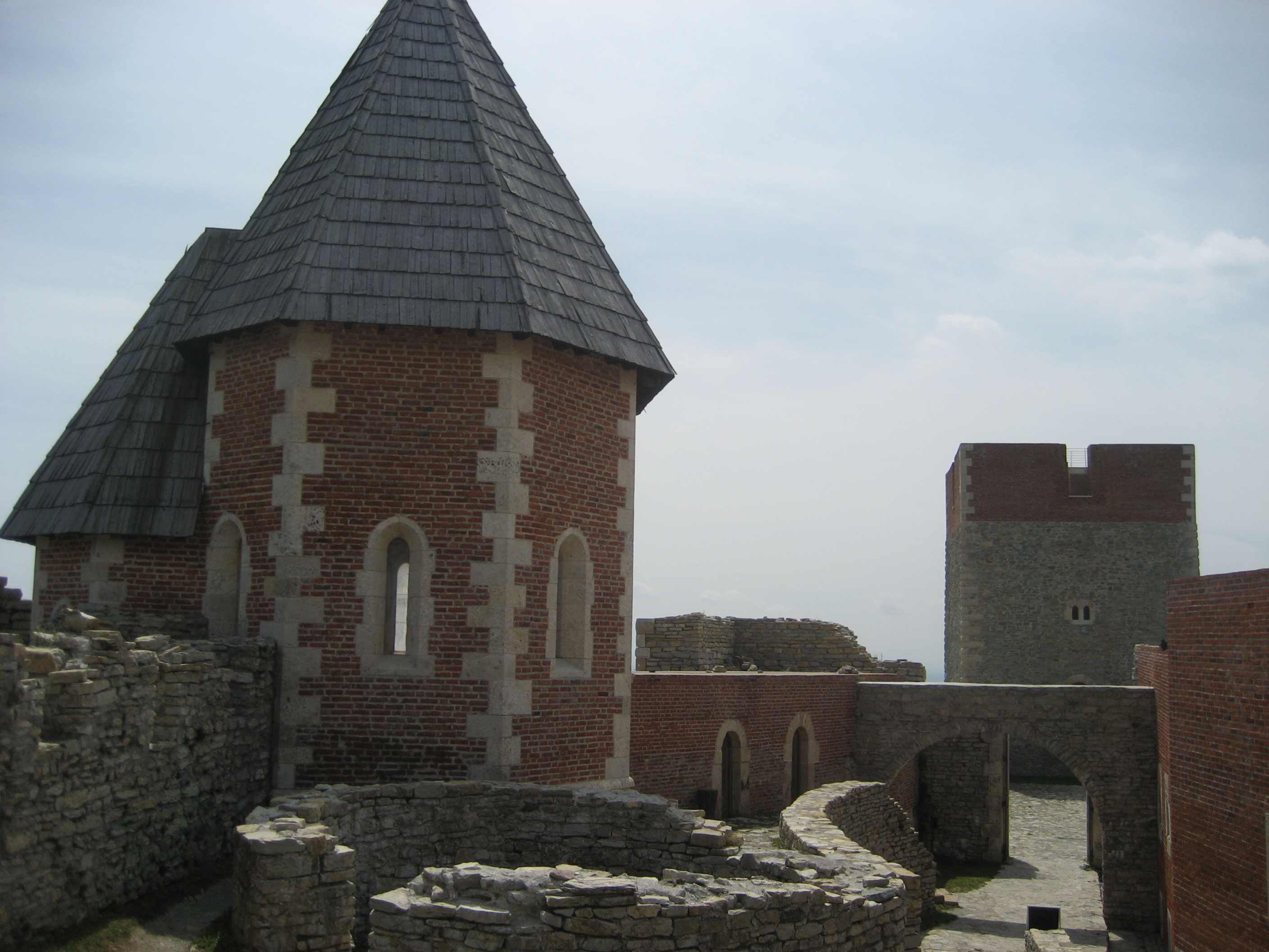 Kapela Svetih Filipa i Jakova u Medvedgradu, Zagreb